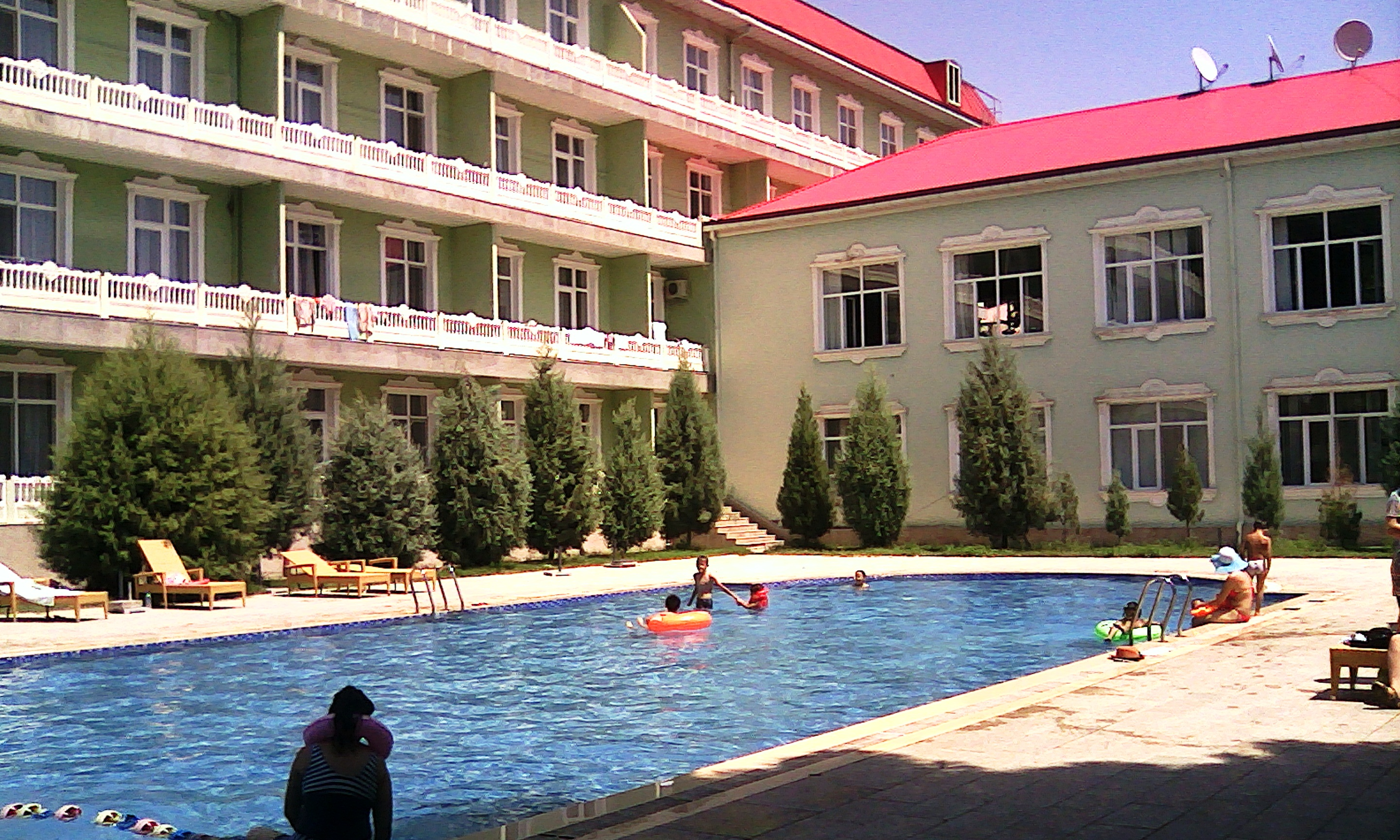 Здание с бассейном, санаторий "Бахористон" г. Гулистон